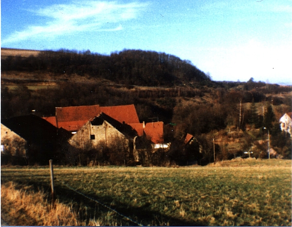 Naumburger Hof bei Ginsweiler (ehem. Burg)